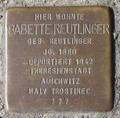 Deutschland (D) - Baden-Württemberg (BW) - Landkreis Esslingen (ES) - Kirchheim unter Teck: Stolperstein für 'Babette Reutlinger'